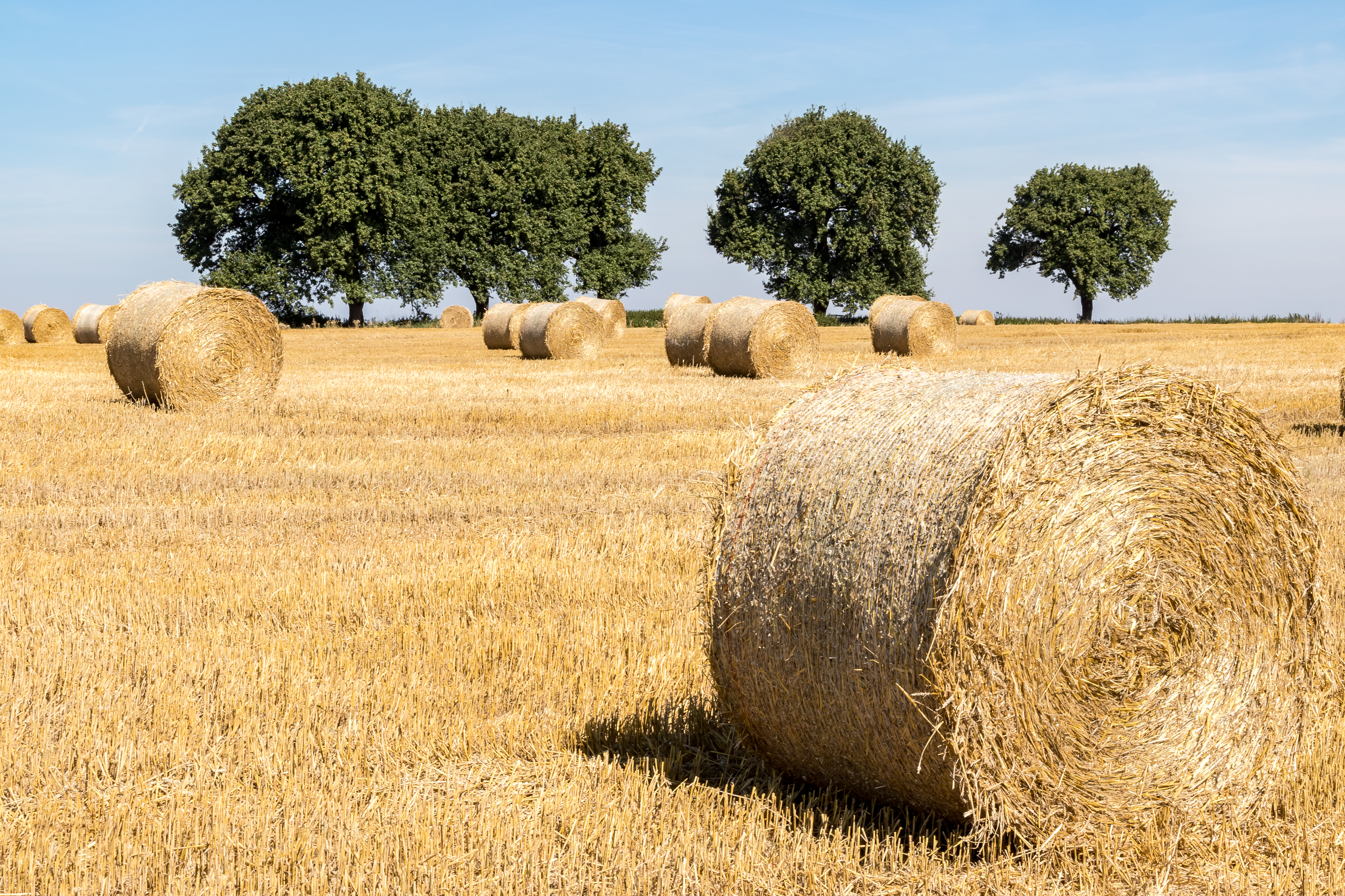 Stoppelfeld mit Stroh-Rollen in der Normandie